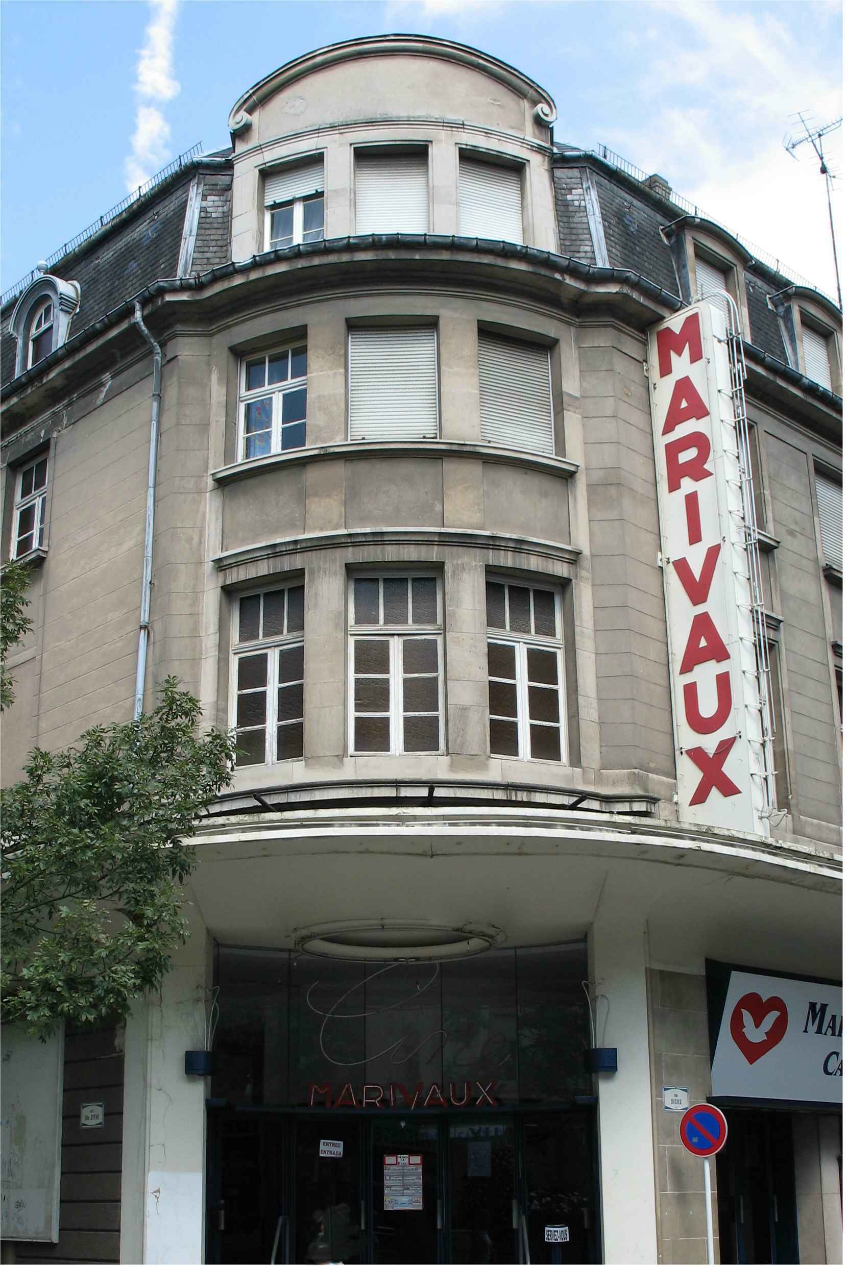 D'Gebäi vum Ciné Marivaux an der Stad Lëtzebuerg.